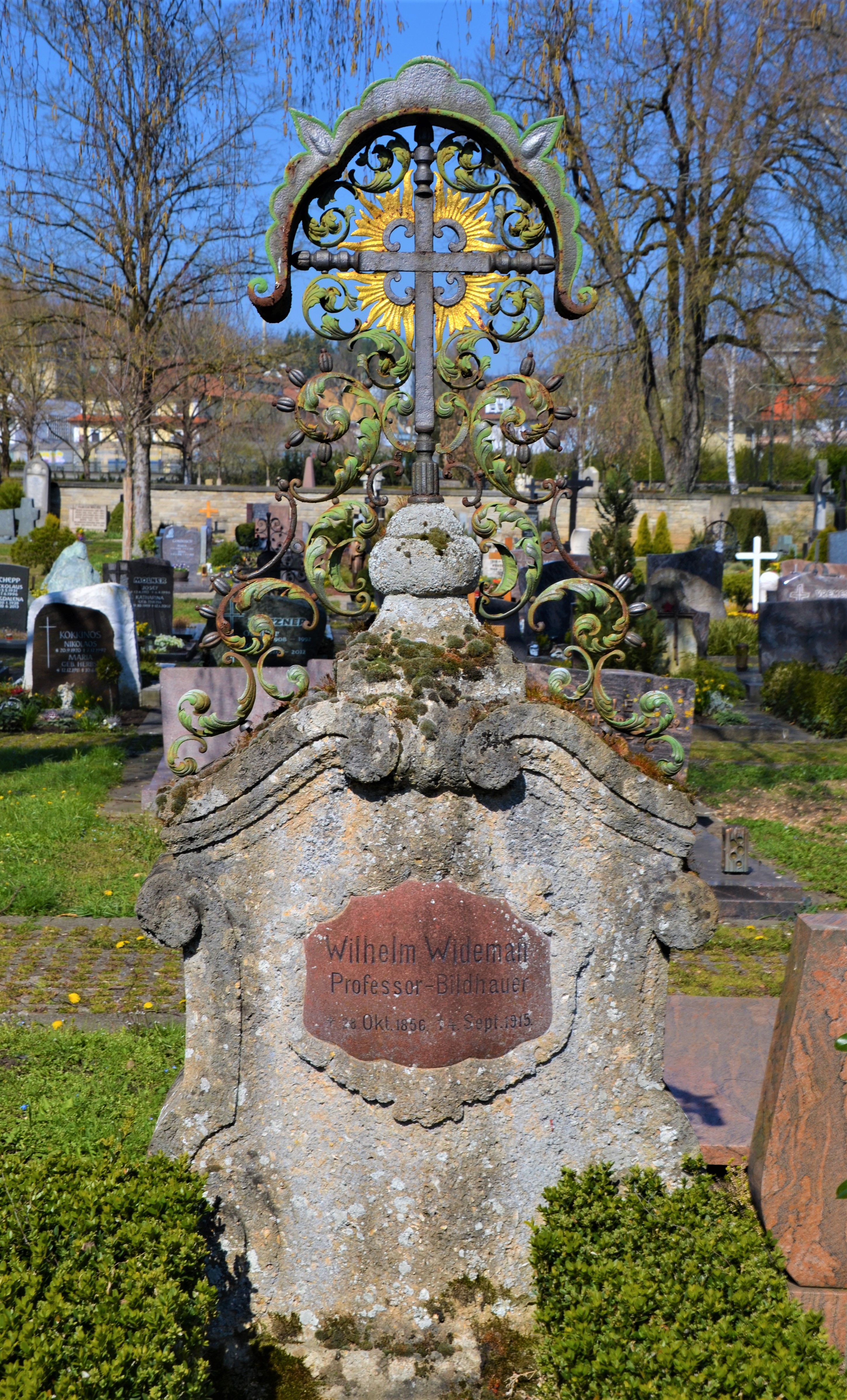 Grabmal von Professor Wilhelm Widemann auf dem Leonhardsfriedhof Schwäbisch Gmünd